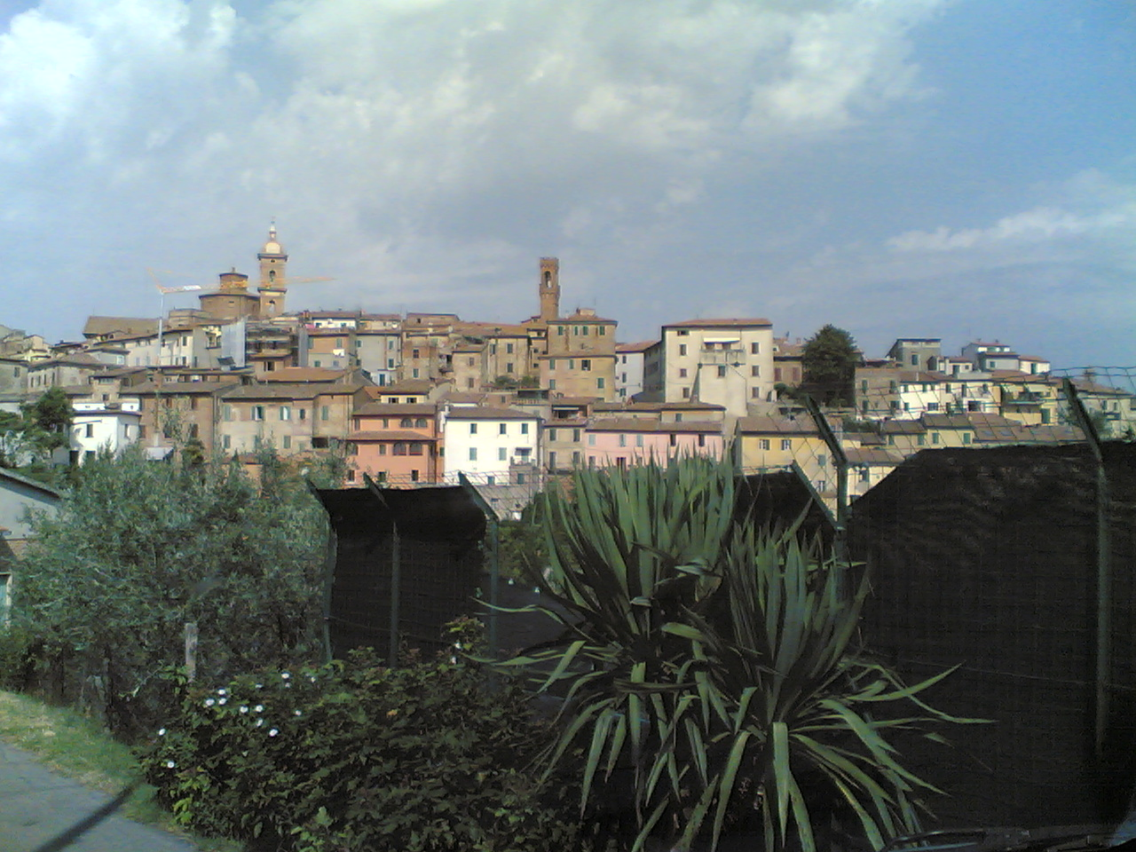 Panorama of Sinalunga (Siena, Italy)